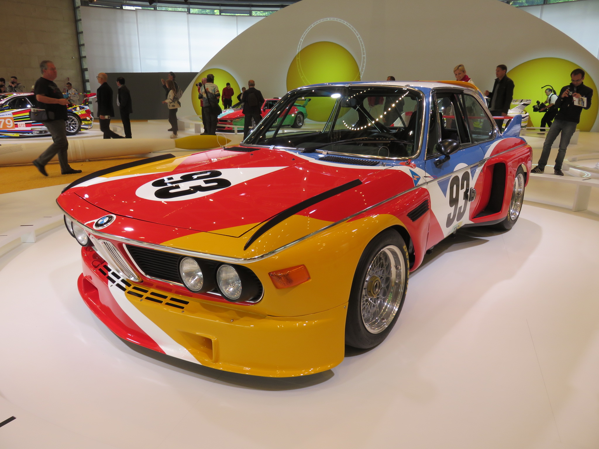 Concorso d'eleganza Villa d'Este 2015